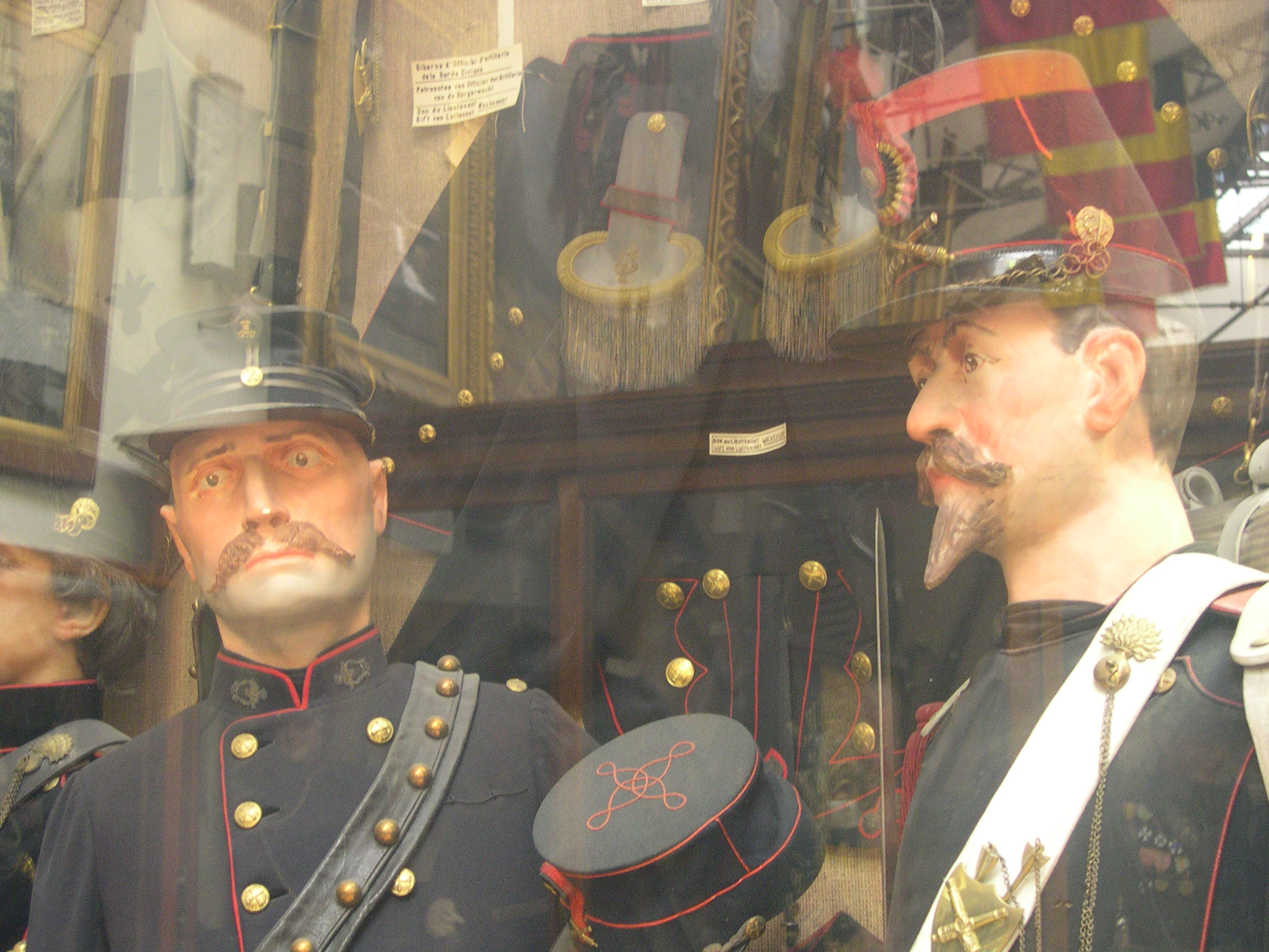 Een kast in de 'oude collectie' : Koninklijk Museum van het Leger en de Krijgsgeschiedenis, Brussel.